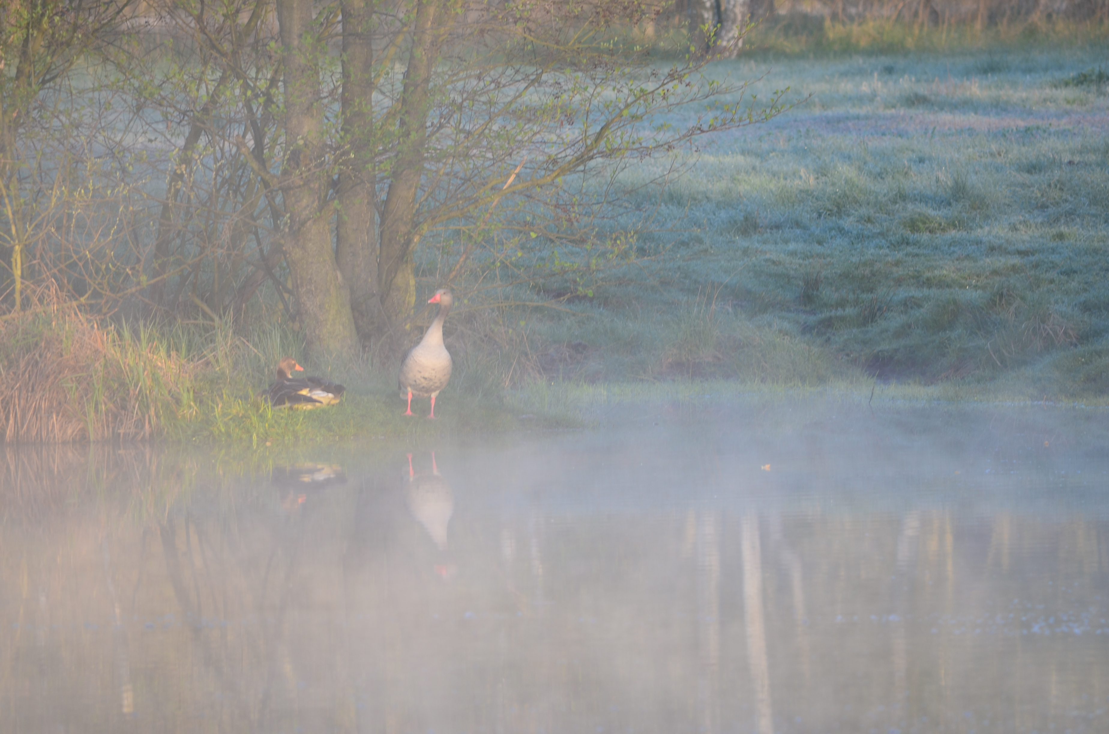 Berlin - NSG Mittelbruch